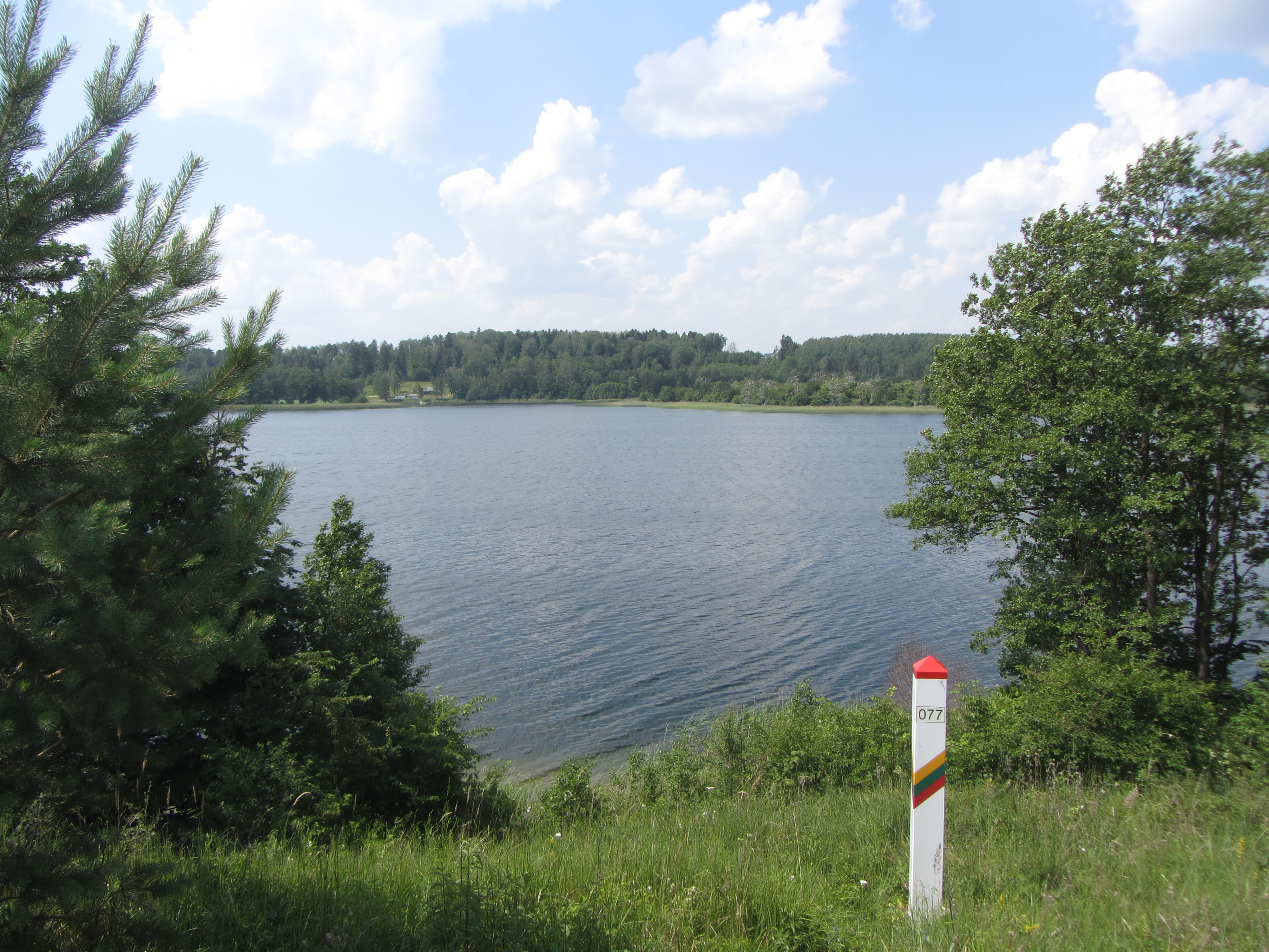 Lazdijų sen., Lithuania